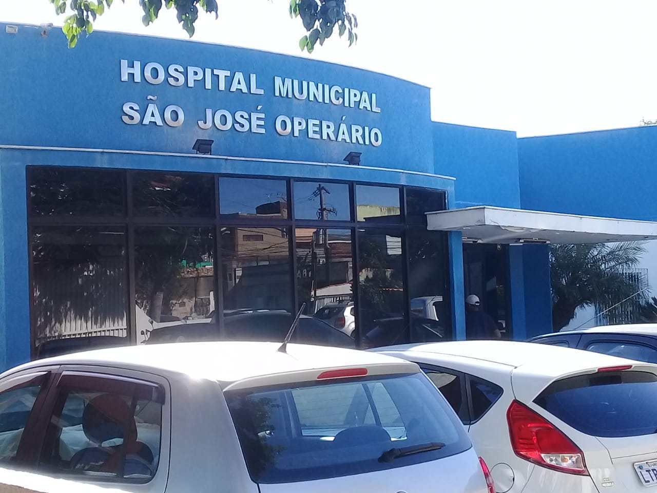 Hospital Municipal São José Hoperário